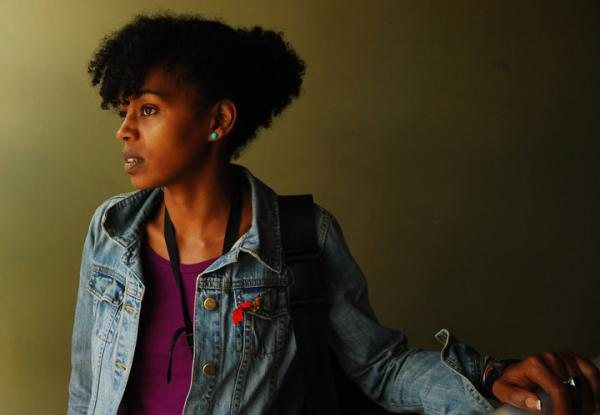 Photo de Aida Mulune